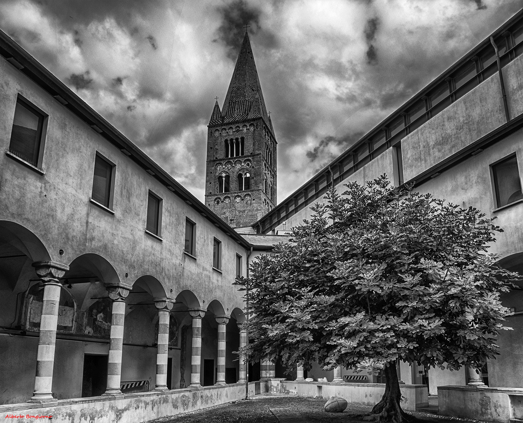 Chiostri e museo di Sant'Agostino This is a photo of a monument which is part of cultural heritage of Italy.